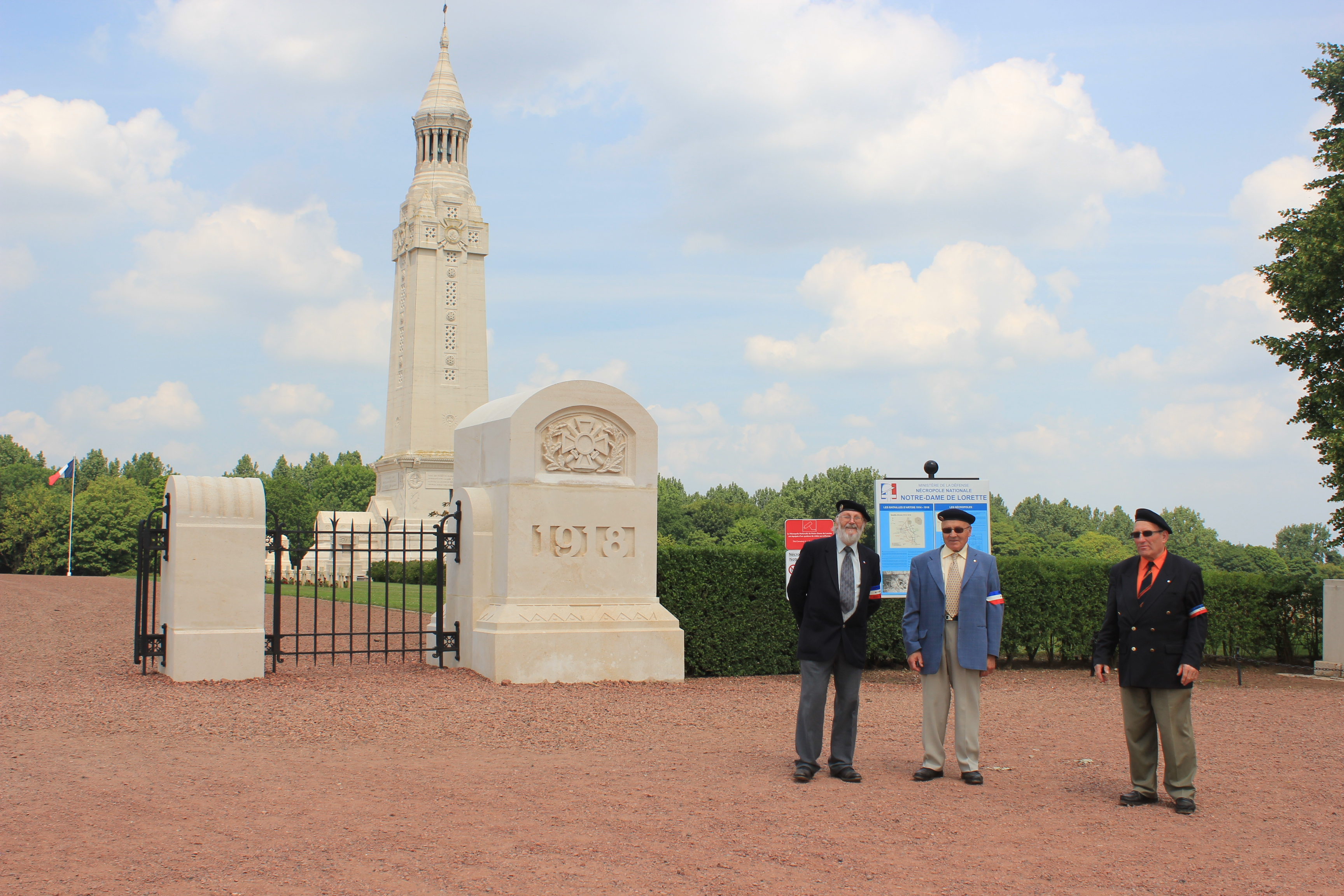 Notre Dame de Lorette (62)Entrée Dans le fonctionnement quotidien de la nécropole, il faut souligner la part importante prise par l'Association du monument de Notre-Dame-de-Lorette, fondée en 1920 par Mgr. Julien, évêque d'Arras, dont la Garde d'honneur assure bénévolement un service d'accueil et de présence à la tour-lanterne (de mars à novembre) auprès des visiteurs et lors des cérémonies, et ranime la flamme chaque dimanche